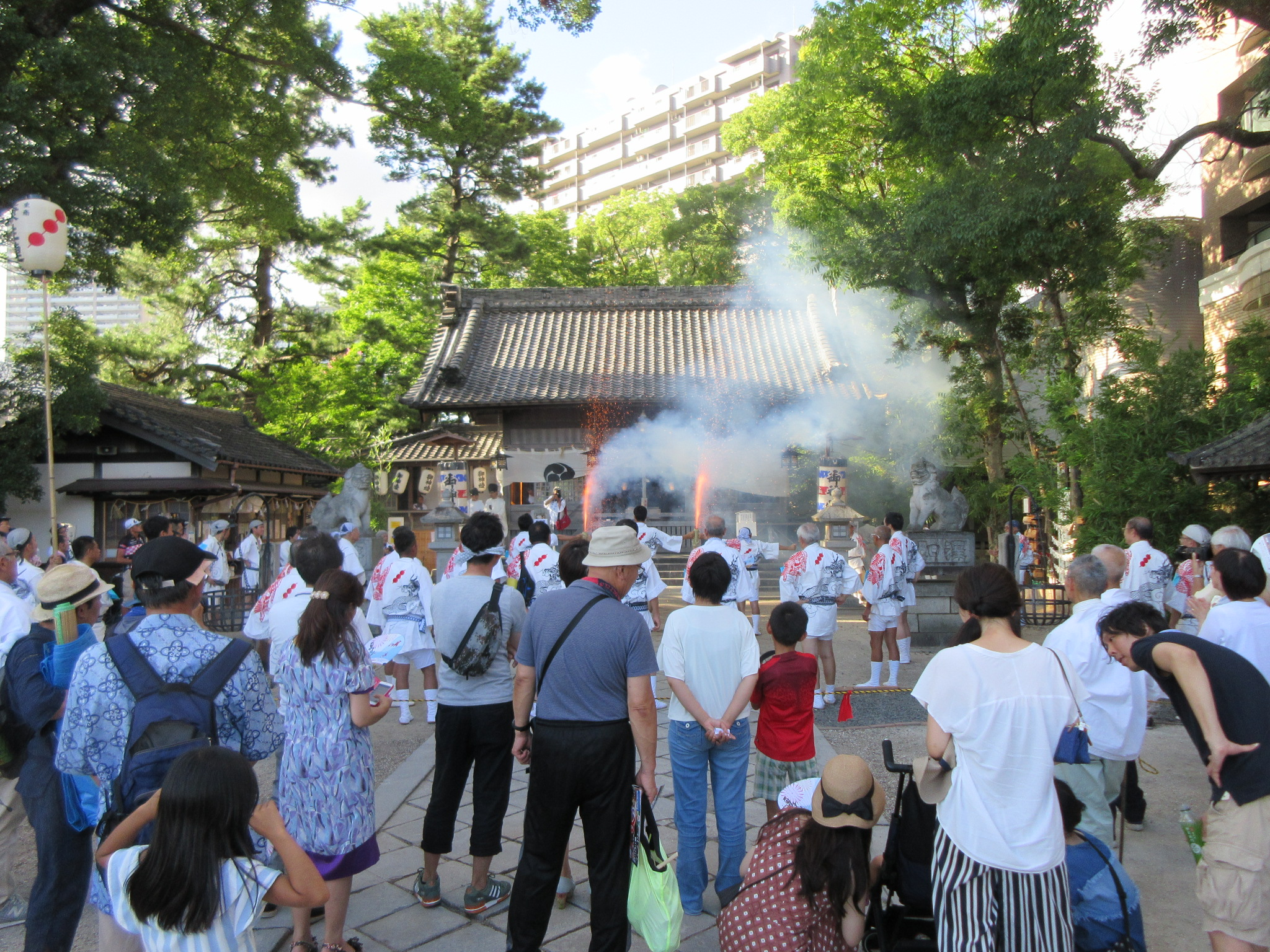 菅生祭の奉納手筒花火